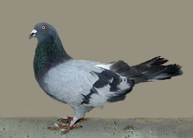 Giant Runt (Blue Bar)